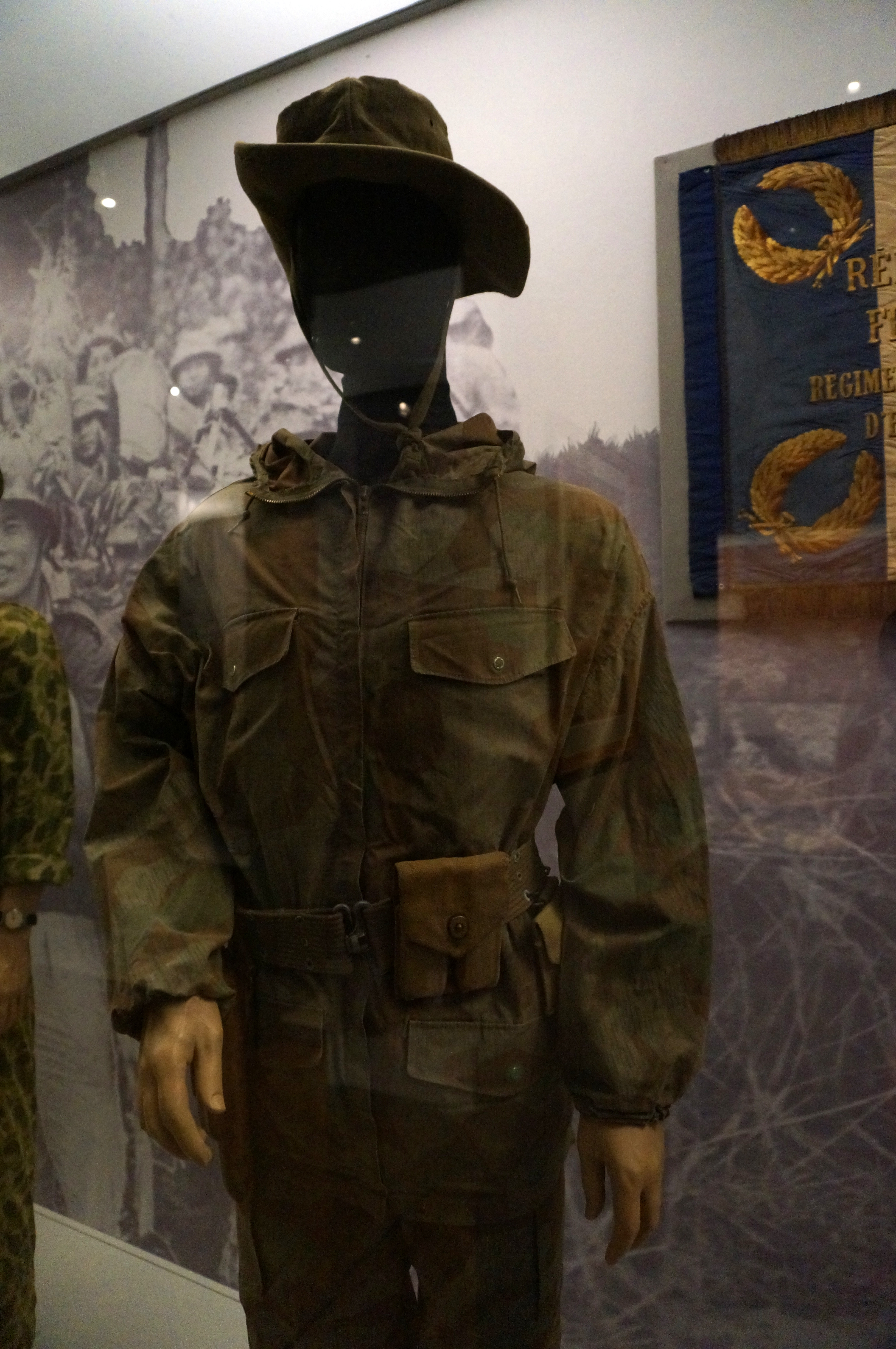 présenté lors de l'exposition Indochine des territoires et des hommes 1856.